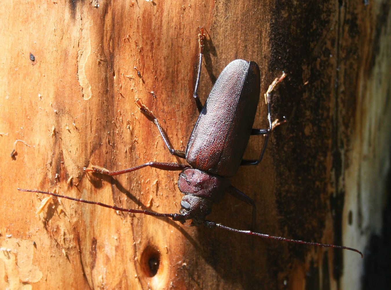 Mulmbock (Ergates faber), Bockkäfer (Cerambycidae) – Georgien/საქართველო: Kleiner Kaukasus, ca. 2 km N Tsagveri/წაღვერი, ca. 1340 m s.m.